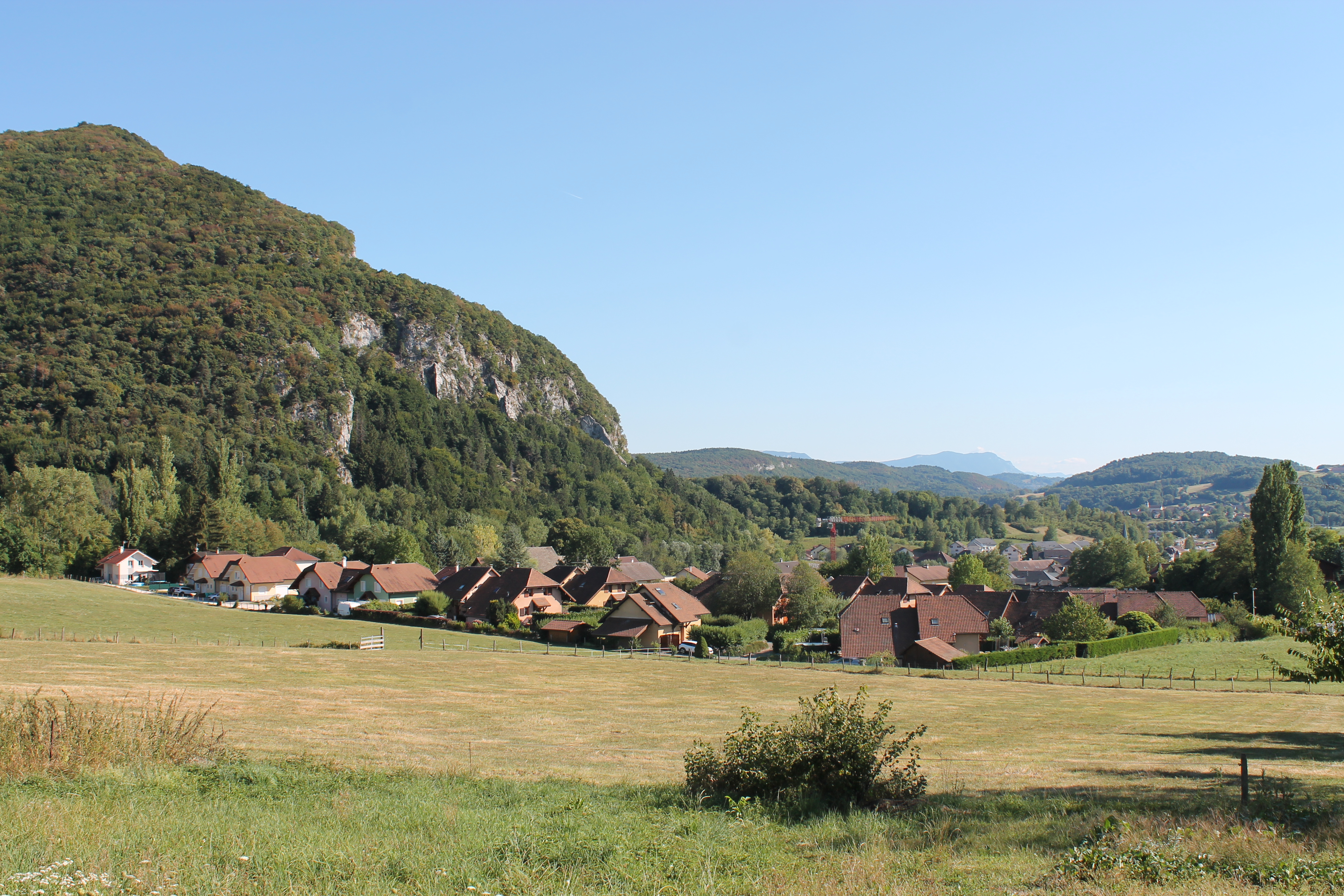 Vue sur La Balme-de-Sillingy (août 2018).